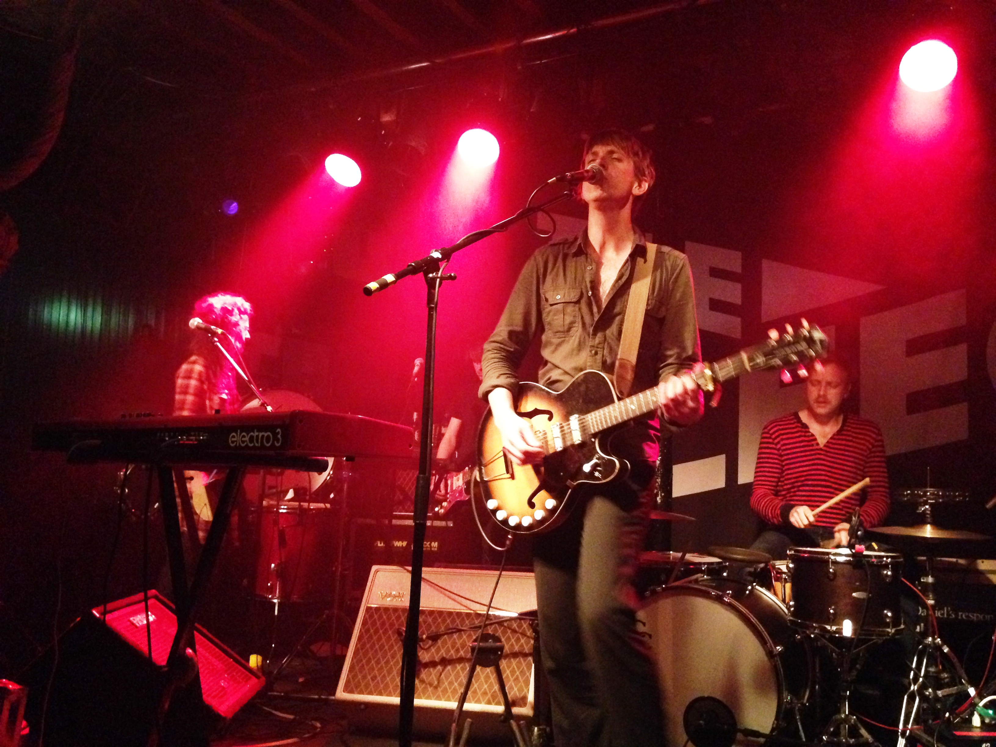 Picture of Shearwater concert in The Fleece, Bristol, May 2 2014